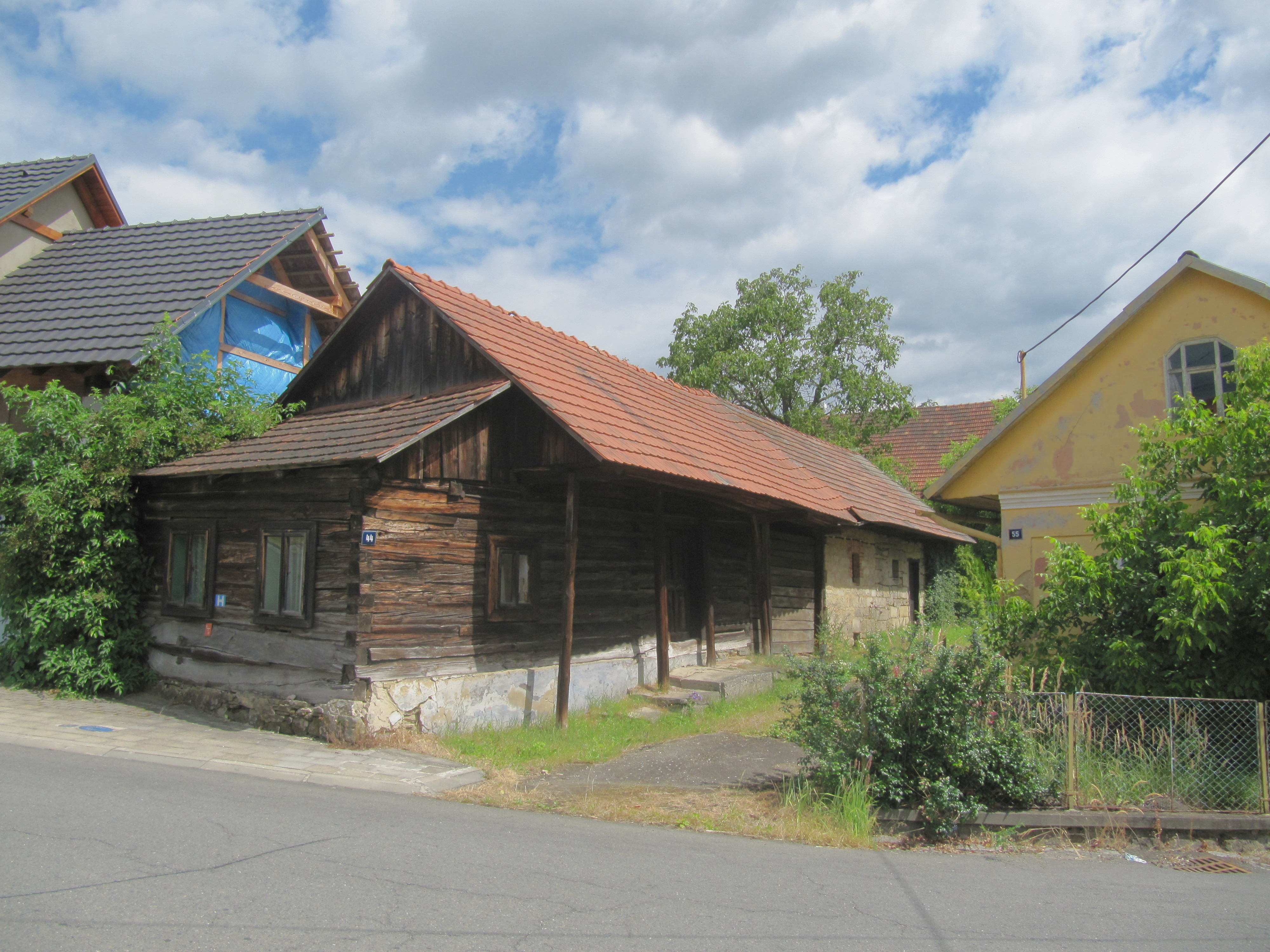 Venkovský dům (Vlachova Lhota, okres Zlín), Vlachova Lhota 44